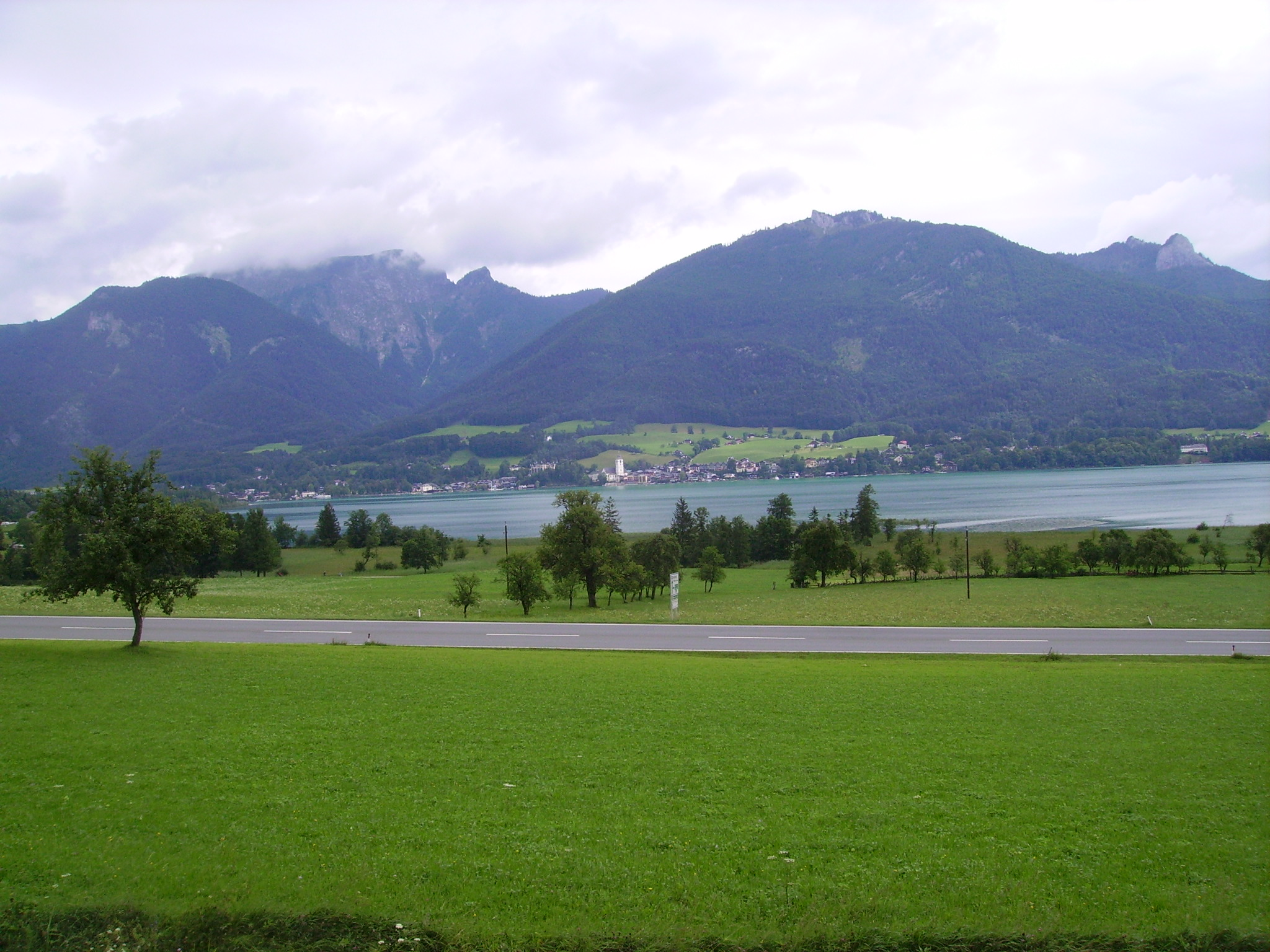 Der Wolfgangsee vom Südufer (Salzburger Gemeindegebiet von Strobl, Katastralgemeinde Gschwendt) aus gesehen; im Vordergrund die Wolfgangseestraße. Im Hintergrund Mitte: St. Wolfgang (zu Oberösterreich gehörig), links: Ried, Gemeinde St. Gilgen), dahinter der Schafberg.